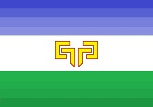 Flag of General Pinedo